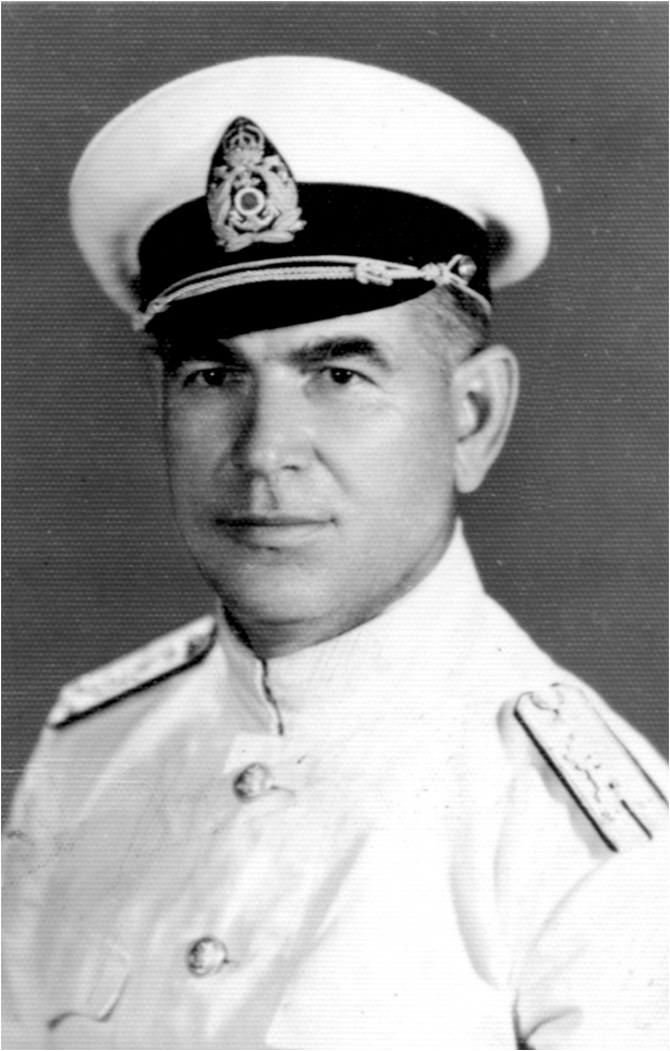 арх. Желязко Богданов